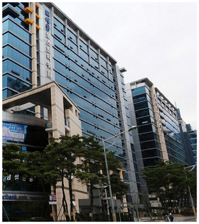 韓国拠点ビル